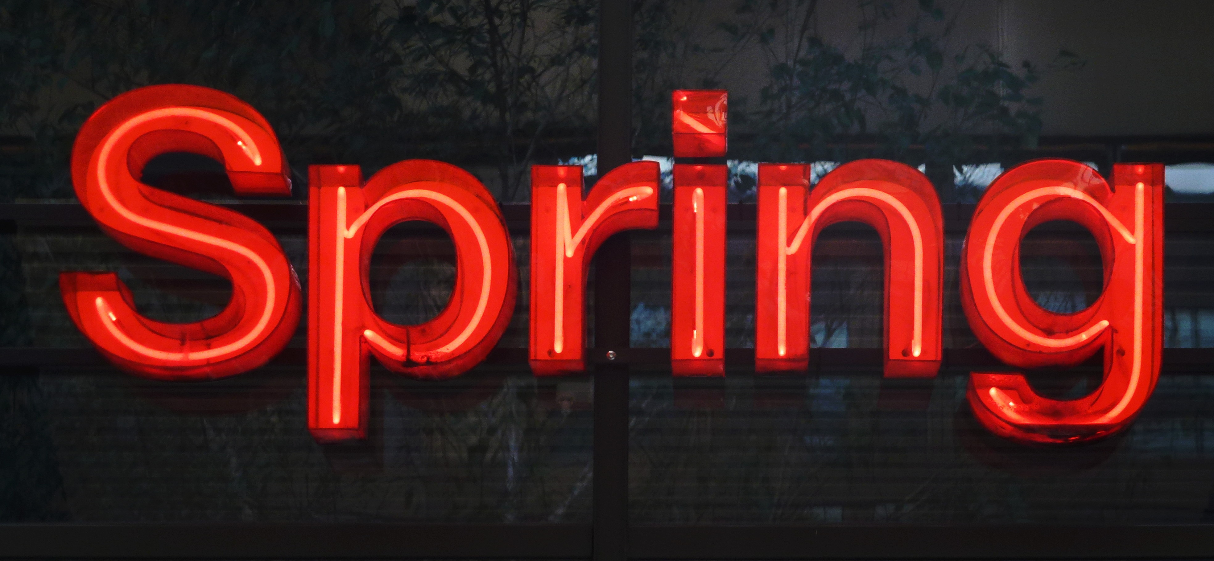 Neonskylt "Spring" Karlavägen 108